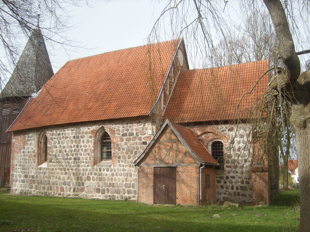 Dorfkirche von Roggendorf bei Gadebusch in Mecklenburg